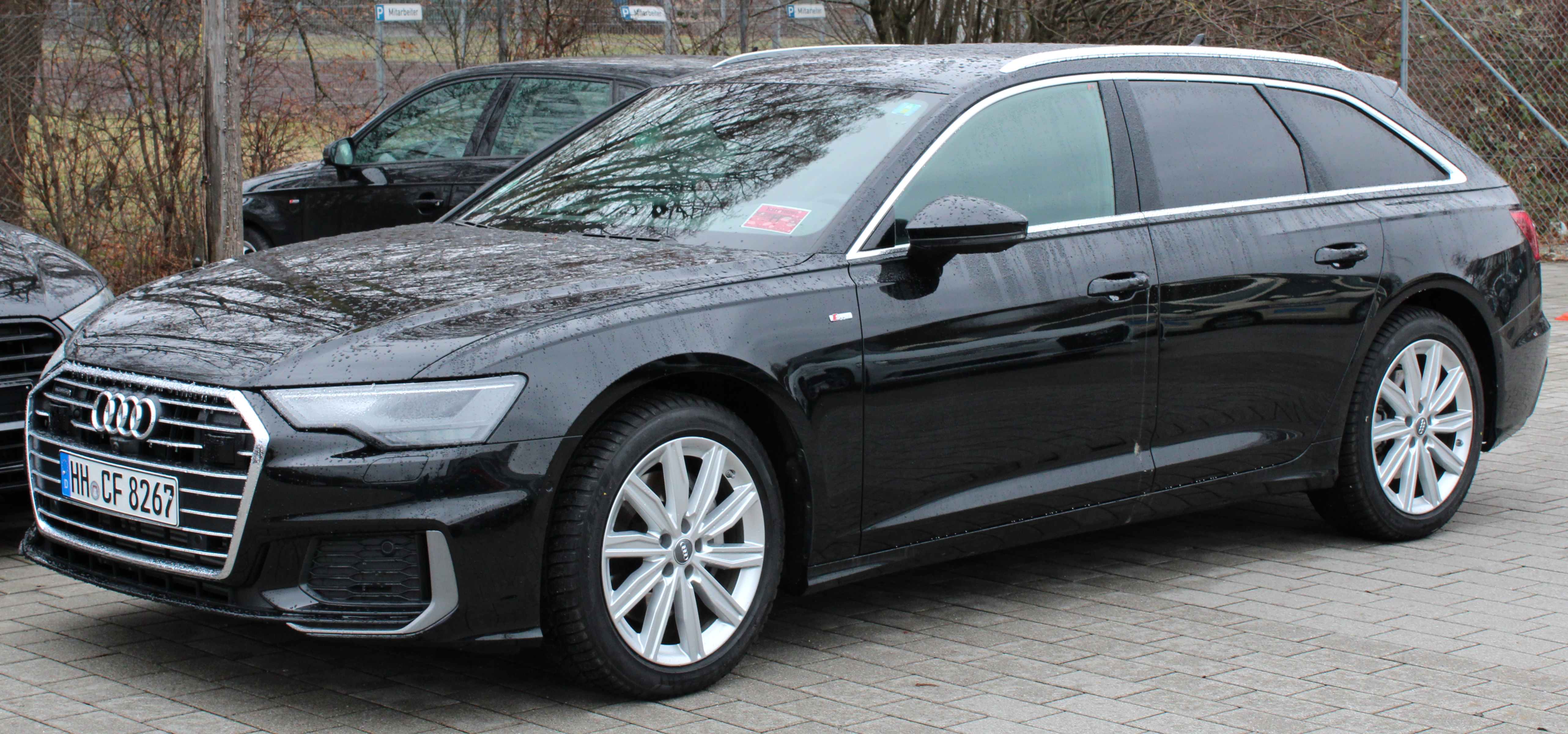 Audi A6 C8 Avant 50 TDI Quattro in Stuttgart-Vaihingen